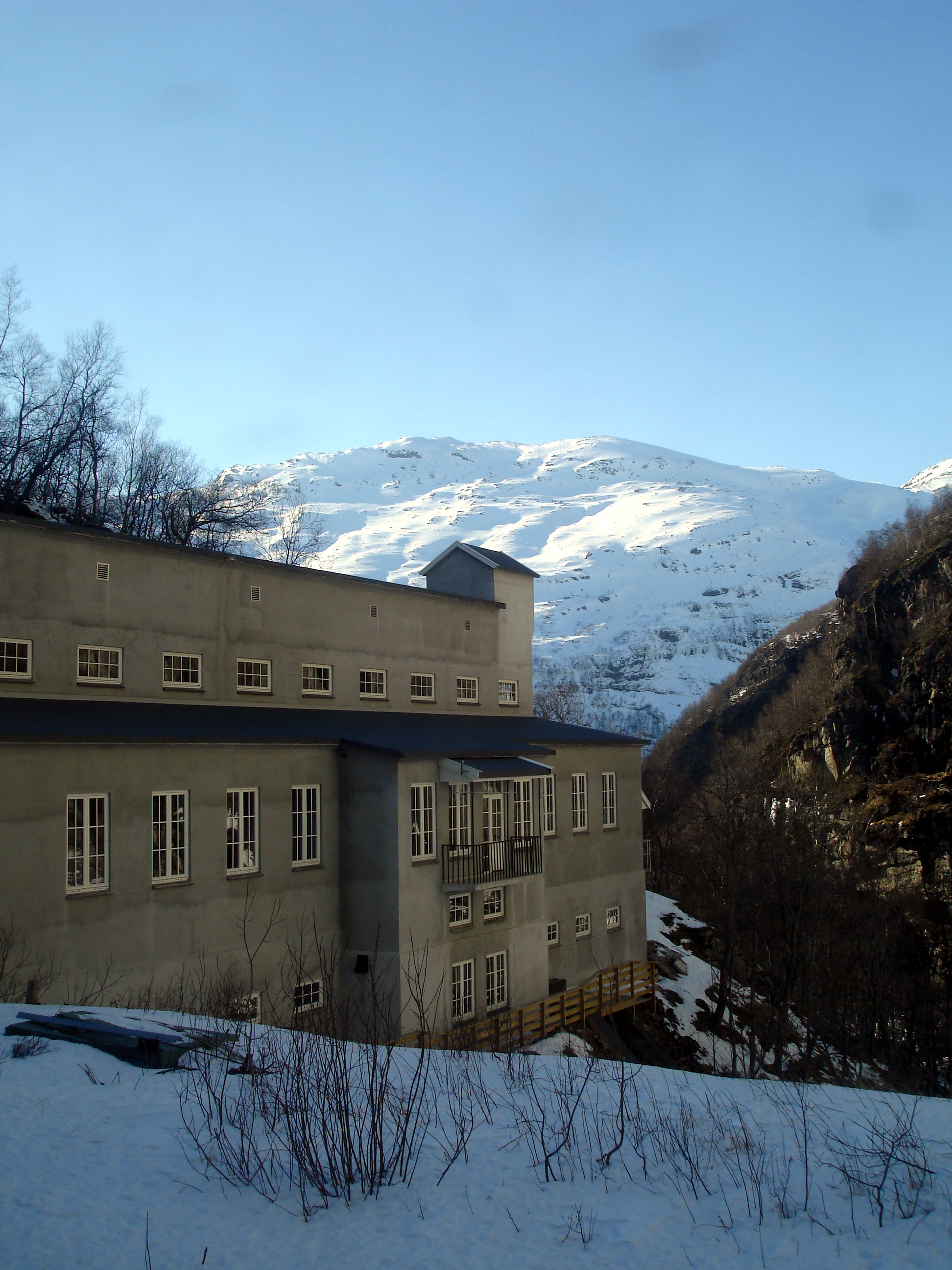 Kjosfoss kraftstasjon ved Kjosfossen i Flåmselvi i Flåmsdalen. Biletet er teke frå Flåmsbana ved Kjosfossen haldeplass.